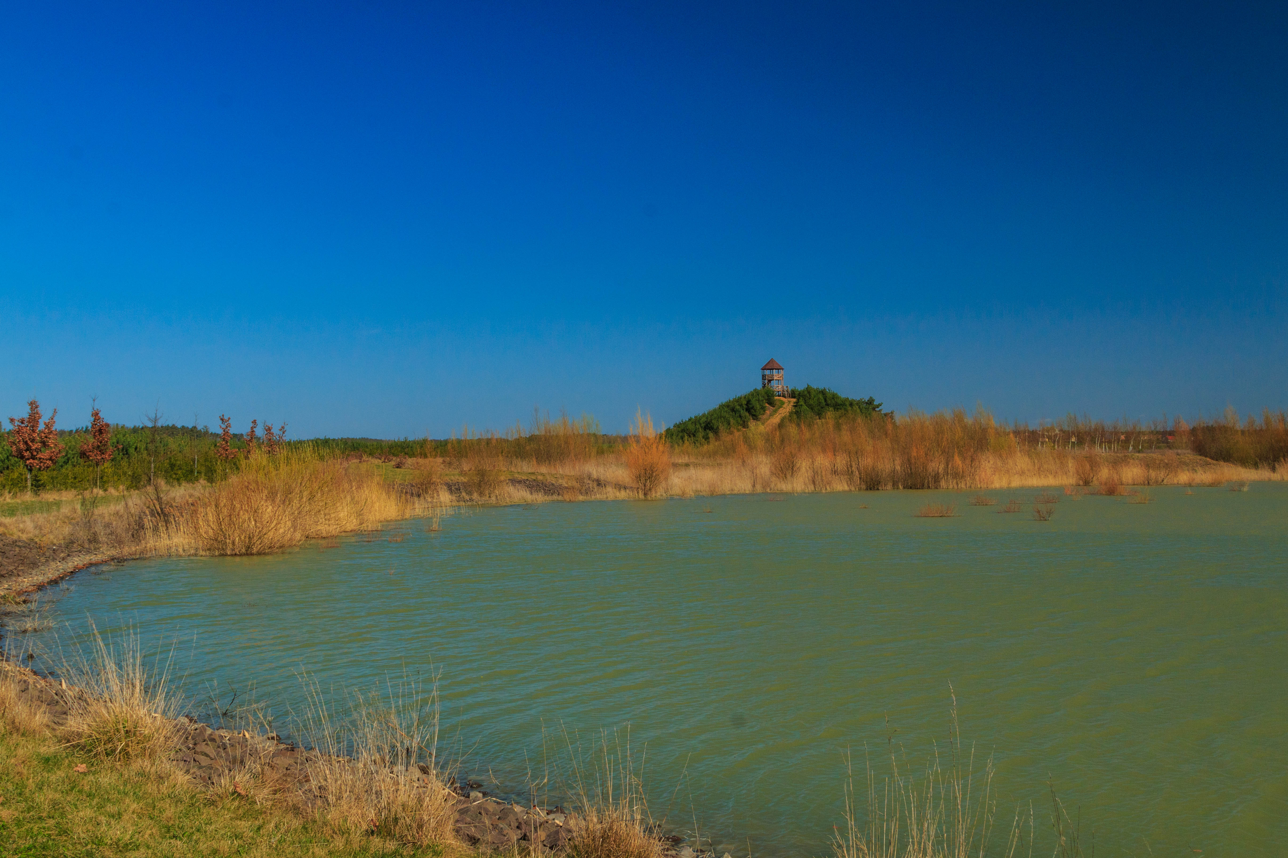 rybníky pod Kosickou rozhlednou - rybník I Project: Vodstvo.